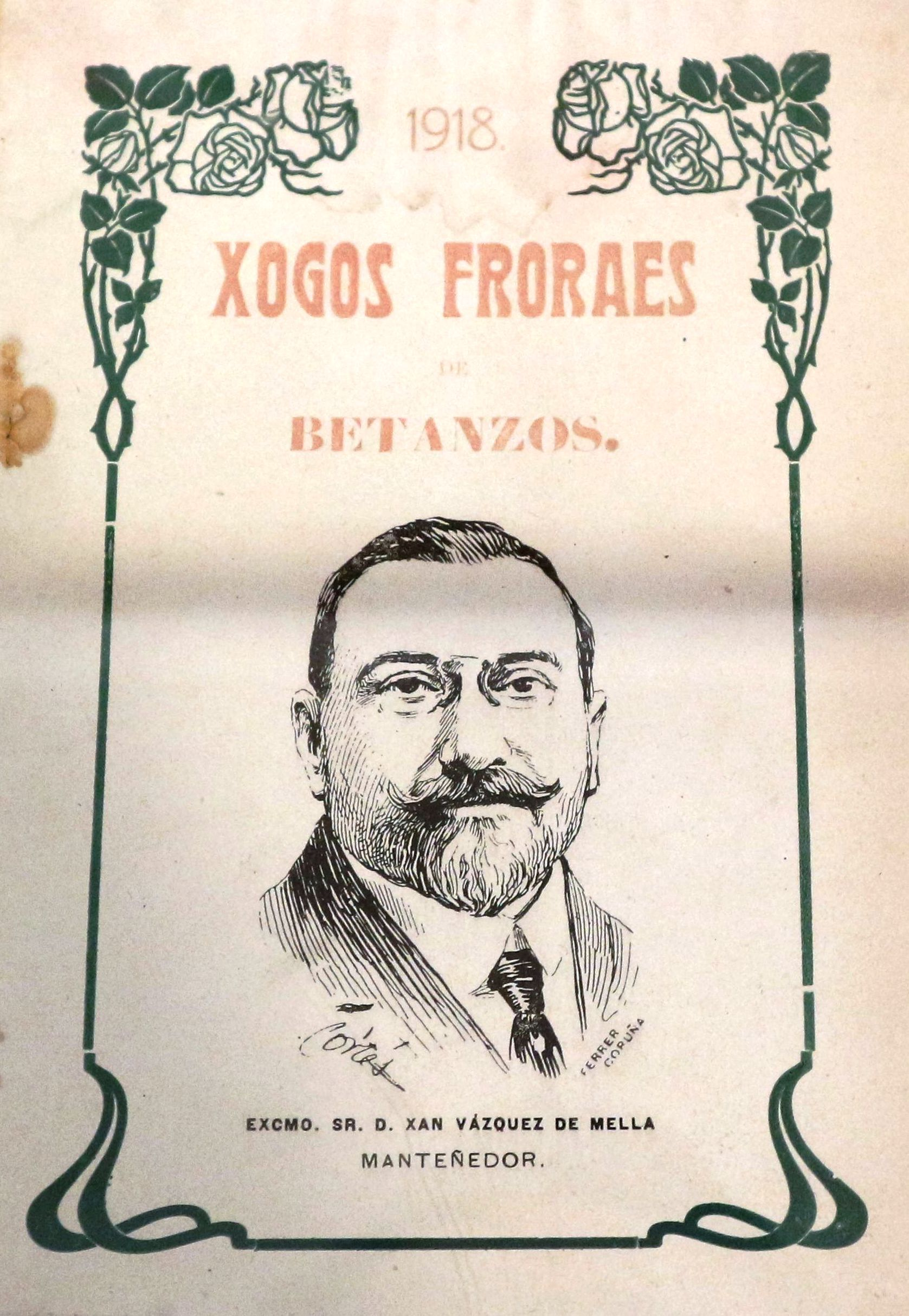 Revista "Xogos Froraes" de Betanzos. Museo das Mariñas e antigo mosteiro de Santo Domingo, Betanzos. Segundo andar, "Símbolos de España e a Galiza".